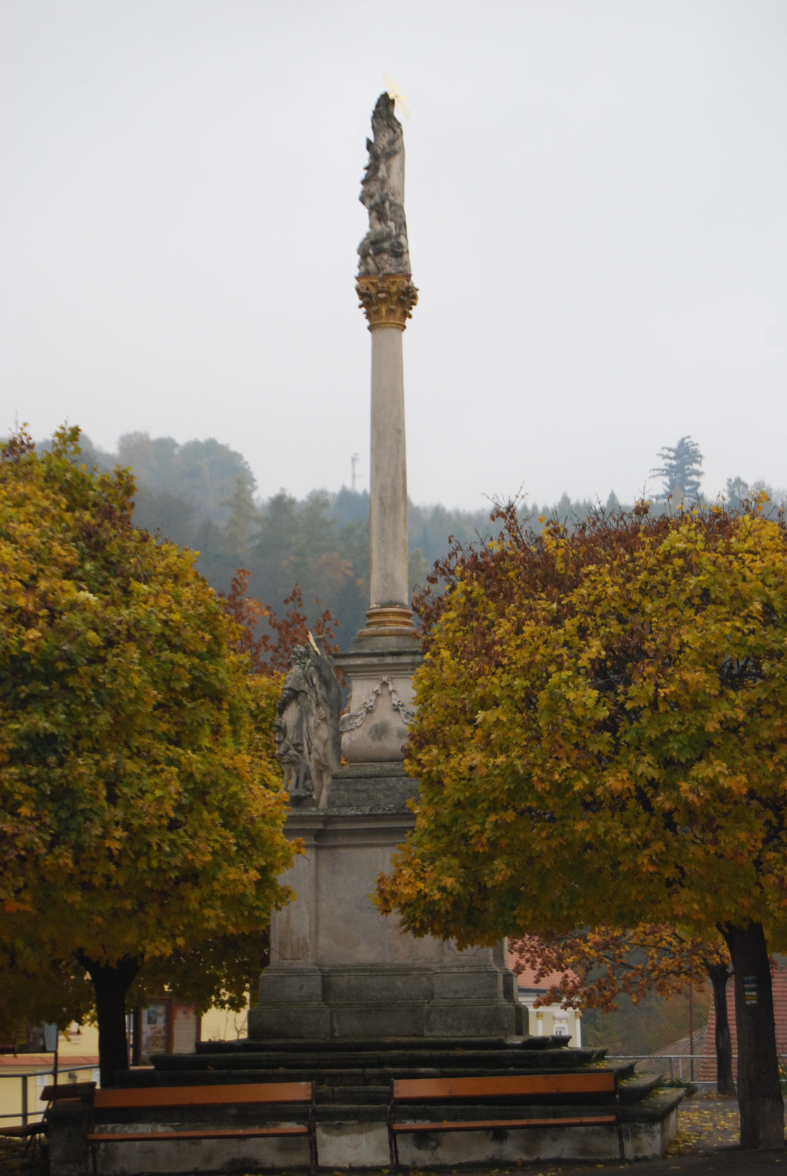 Morový sloup. Vranov nad Dyjí. Okres Znojmo. Česko.